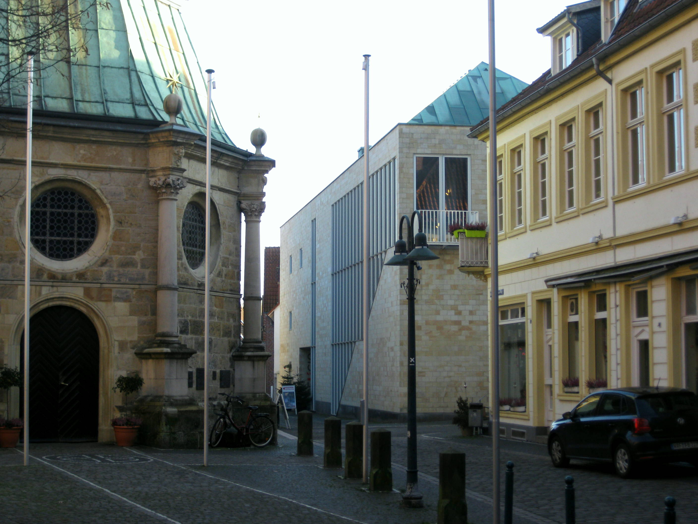 Marienkapelle (1737) von Peter Pictorius und Museumsneubau (1994) von Architekt Josel Paul Kleihues in Telgte